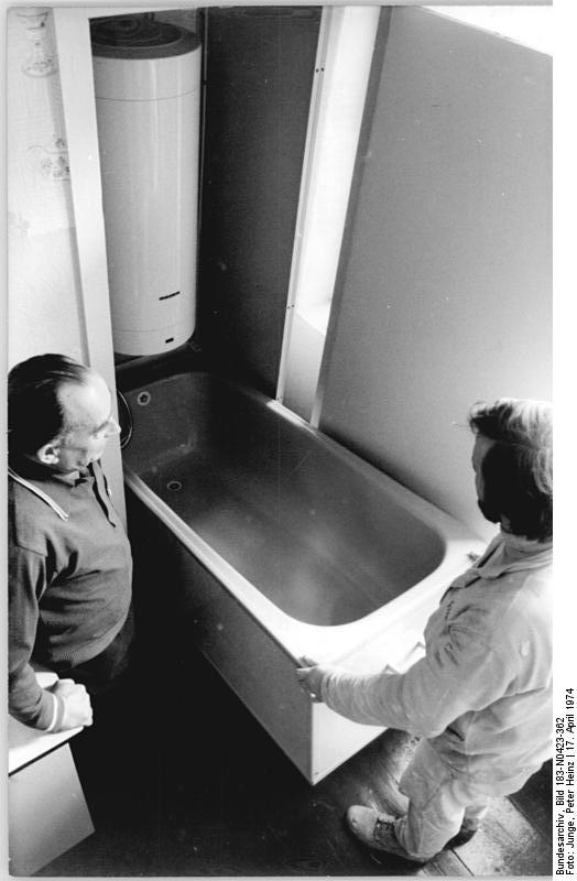 ADN-ZB-Deutsche Demokratische Republik 17.4.74 "Verjüngungskur" für alte Berliner Häuser. Ein Monteur des Baureparaturenbetriebes erklärt Herrn König das "Ausklappen" seines Badezimmers. Das "Schrankbad" ist mit einem elektrischen 80-Liter-Warmwasserspeicher und mit einer Handbrause ausgestattet. Reporter: Junge Copyright: ADN-Zentralbild.